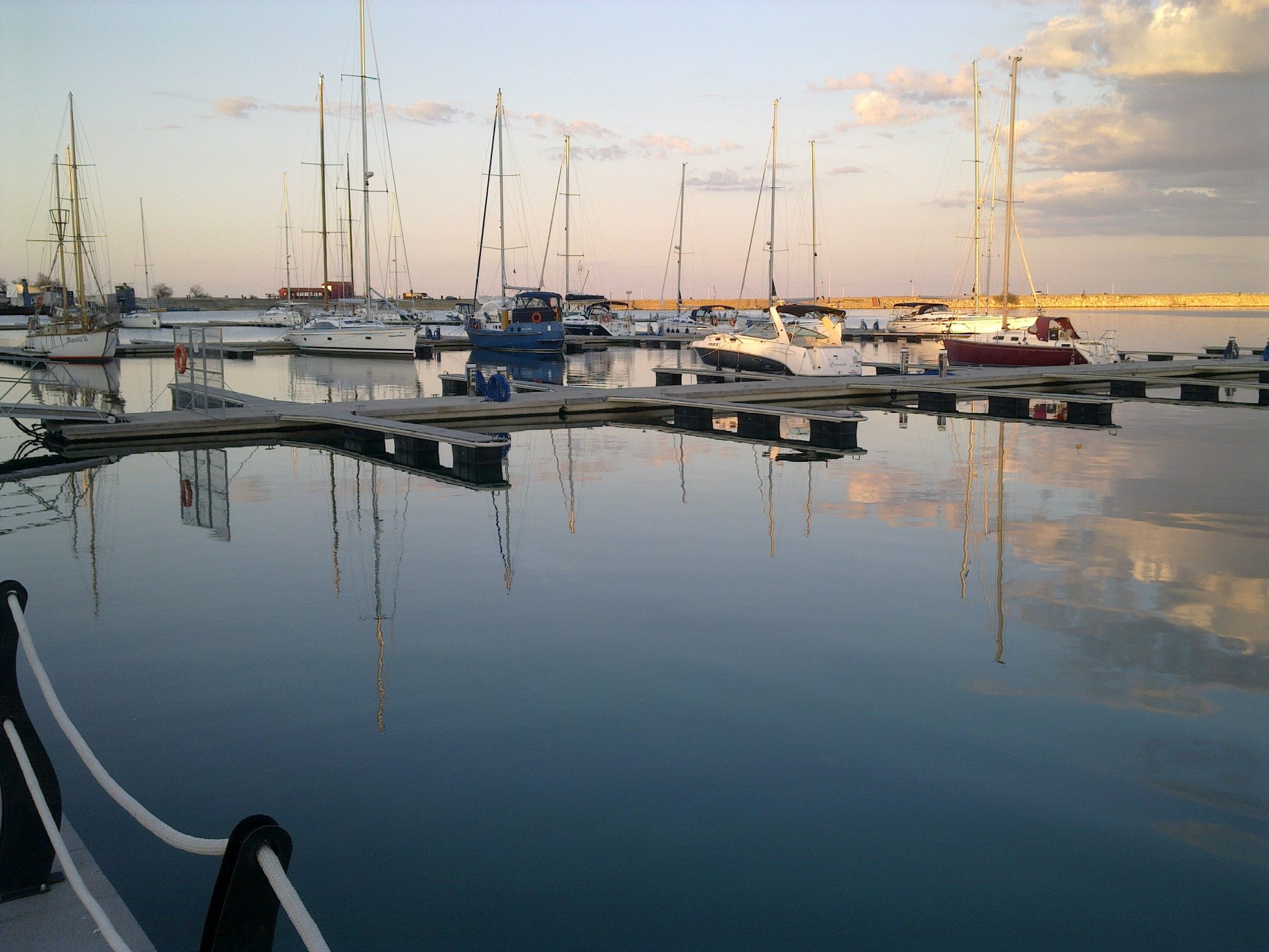 Portul Turistic Mangalia - Marea Neagra/Romania